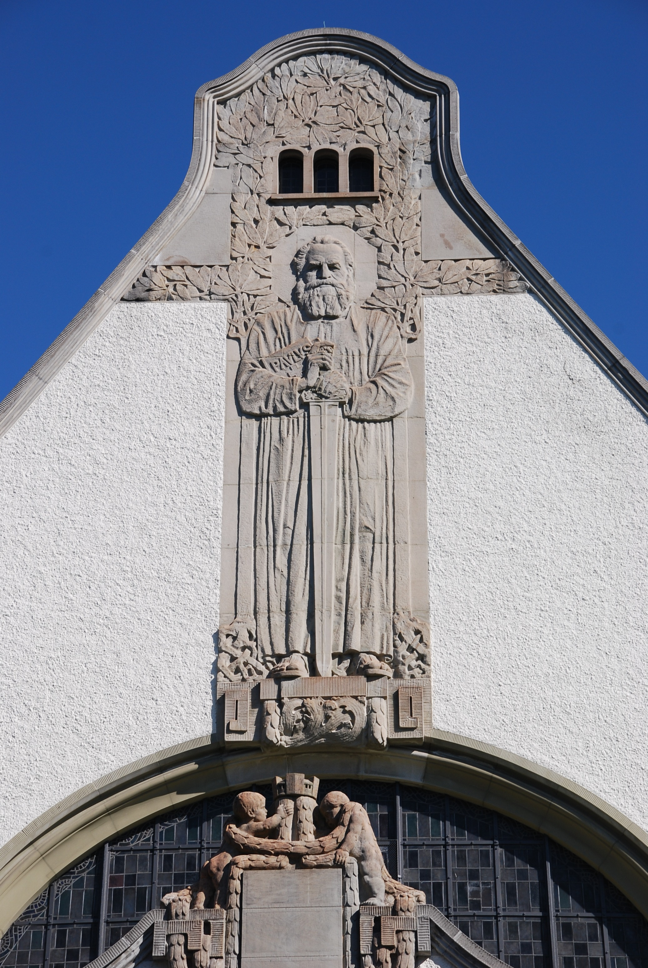 Detail der Pauluskirche in Bern.